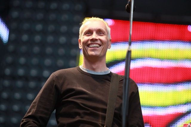 Farin Urlaub, bürgerlich Jan Vetter, Gitarrist der Band Die Ärzte, am 15. Juni 2013 im Kölner RheinEnergieStadion.